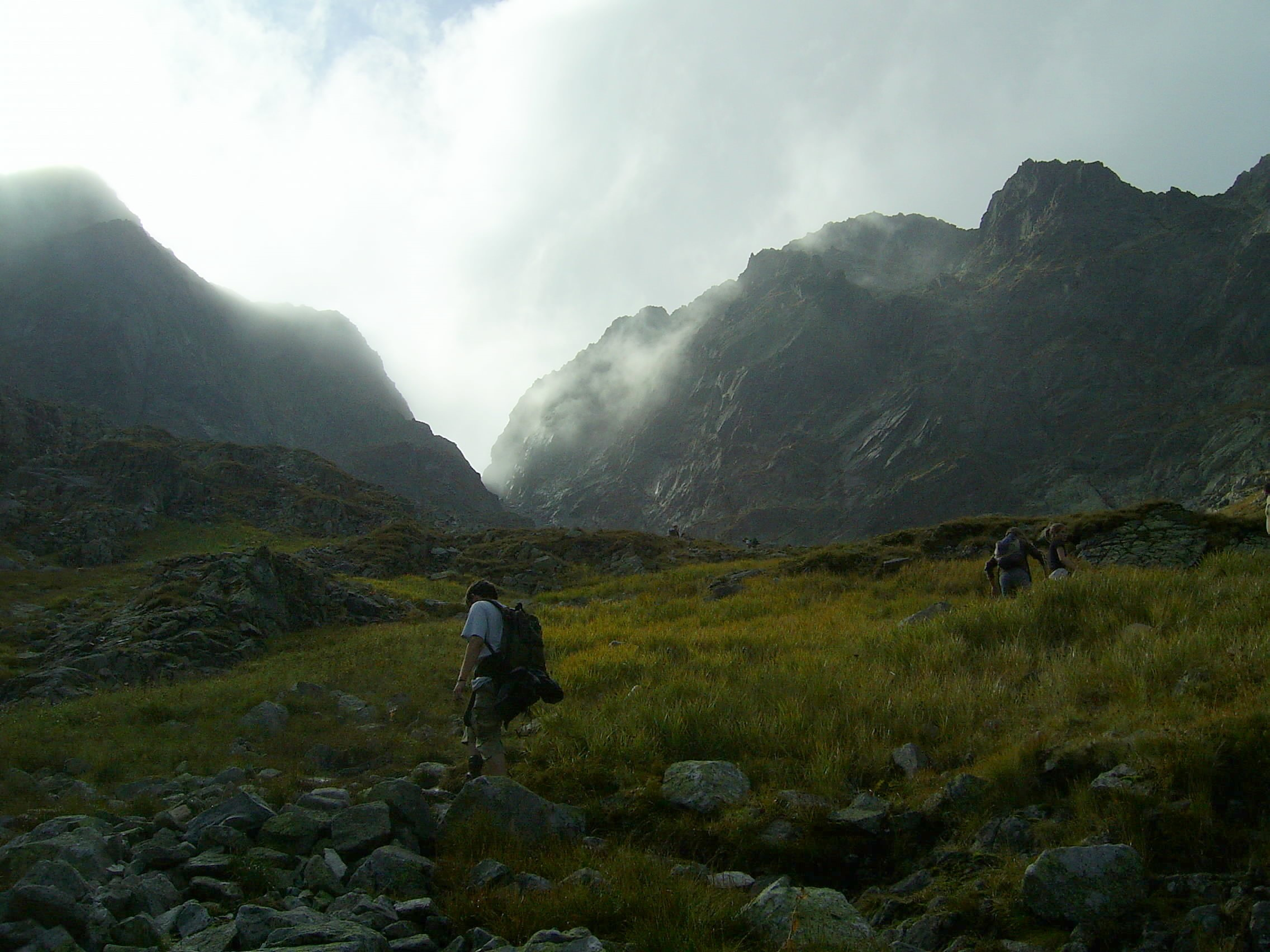 Zawrat od strony Doliny Gąsienicowej